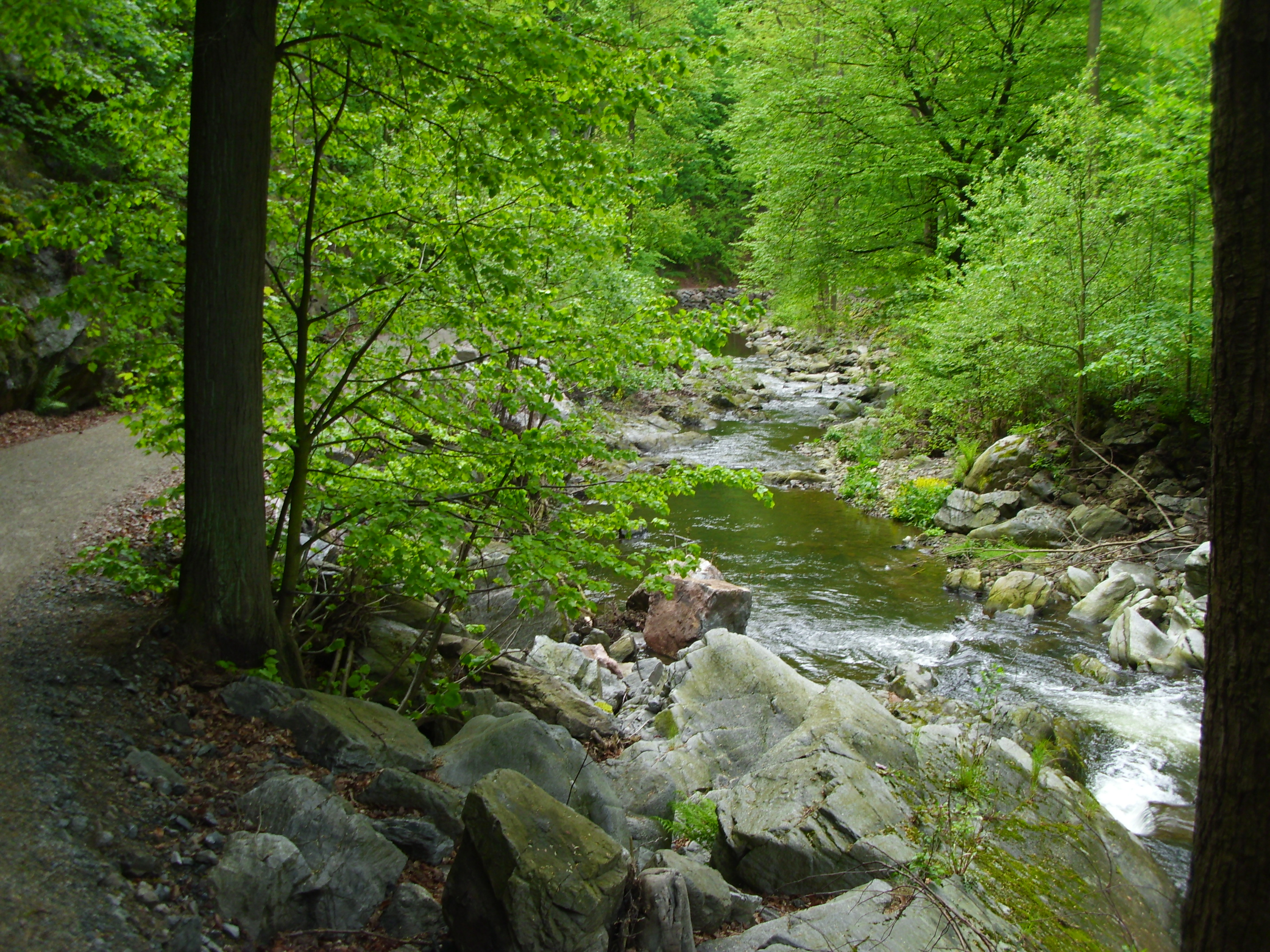 Die Weißeritz fließt gleich neben dem Weg durch den Rabenauer Grund.